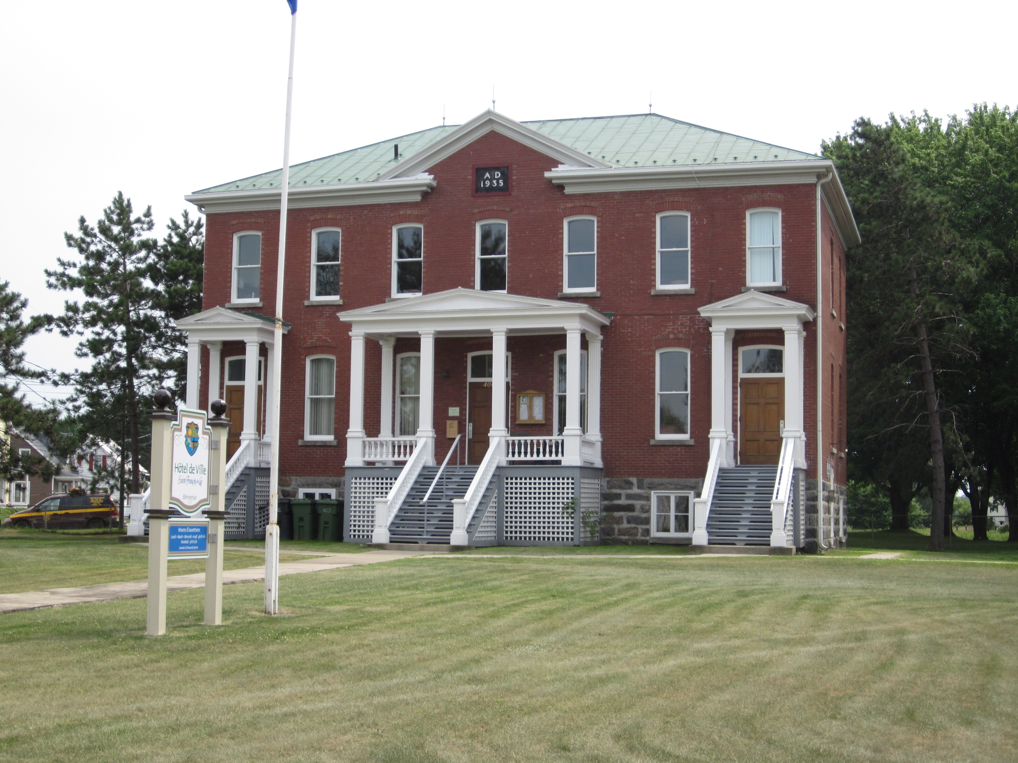 L'hôtel de ville de Saint-François-du-Lac est un bâtiment construit en 1906. Il a servi entre autres de palais de justice, de bureau d'enregistrement. Il a été cité monument historique en 1994.